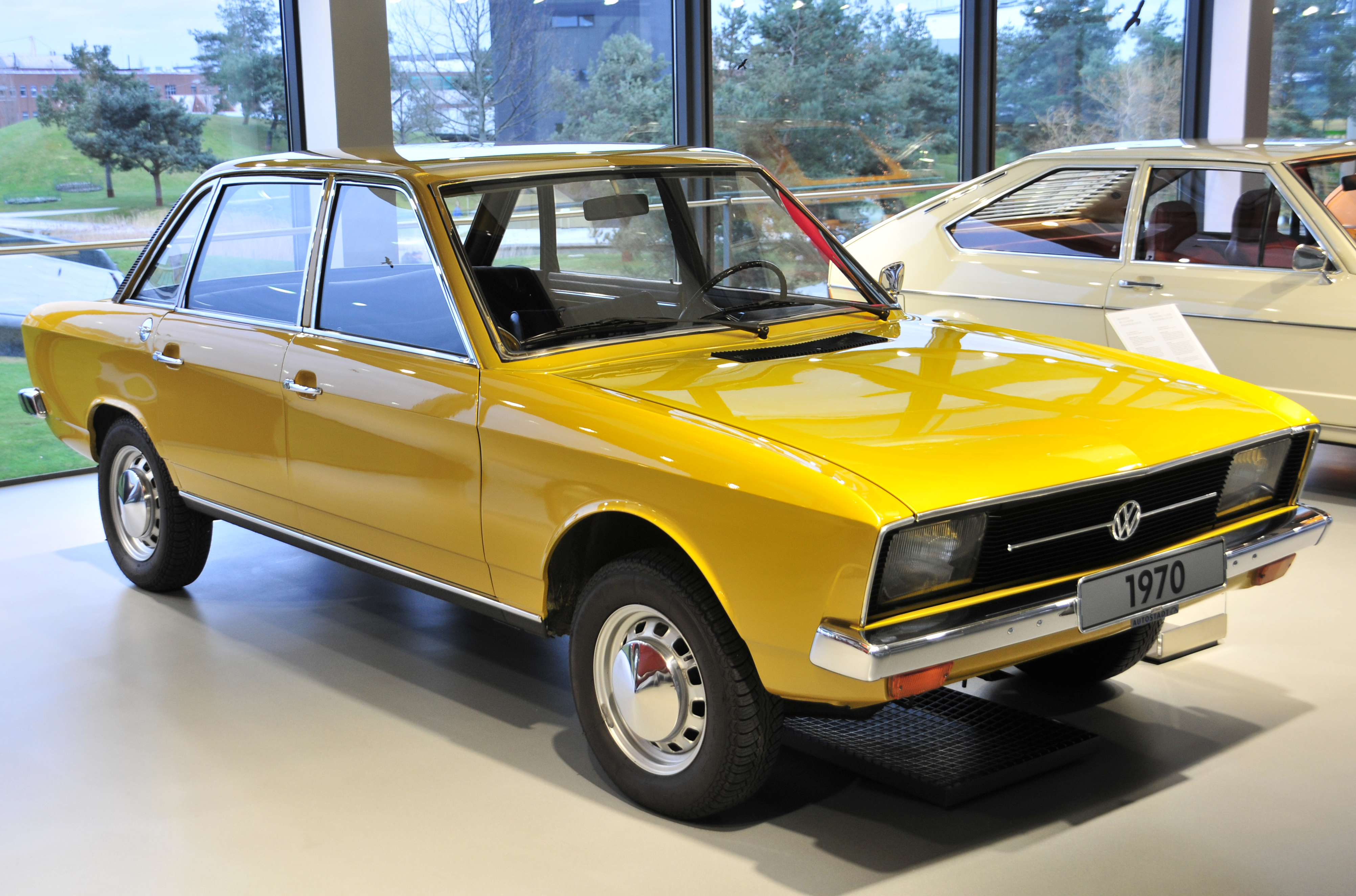 Fahrzeug in der Autostadt Wolfsburg Volkswagen K70L